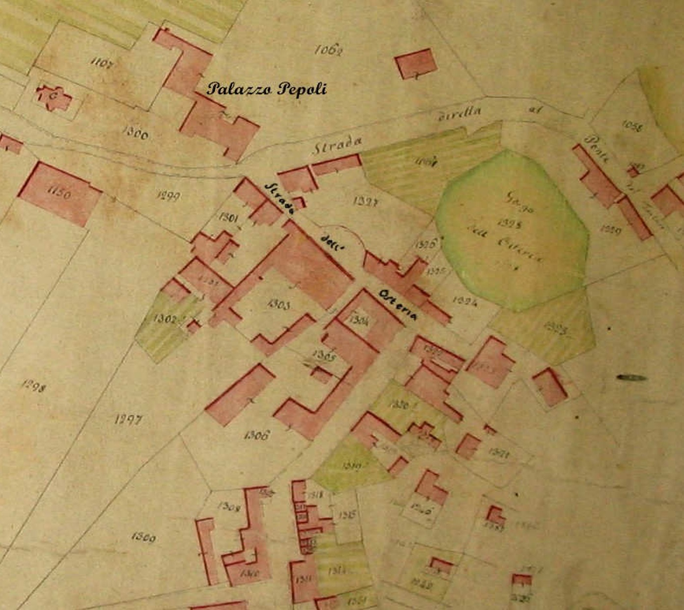 Mappa catastale napoleonica di Trecenta (1808). Si nota sulla destra il Gorgo dell'Osteria, interrato nel 1930.